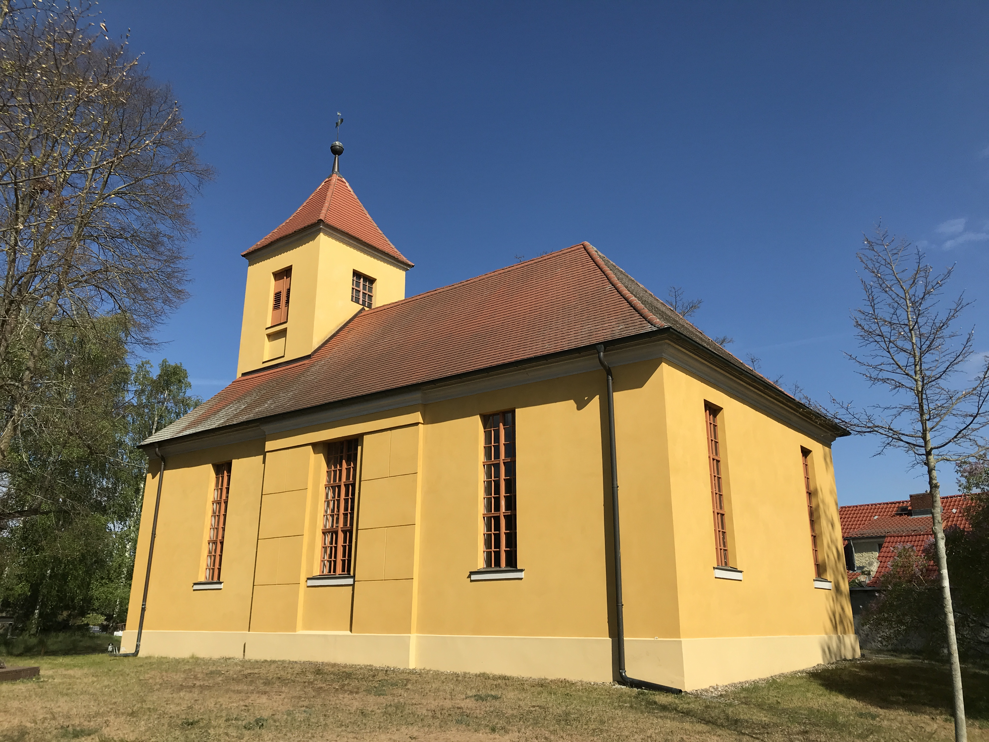 Die Dorfkirche Wernsdorf ist eine Saalkirche aus dem Jahren 1801 bis 1803 in Königs Wusterhausen. Im Innern steht unter anderem eine Hufeisenempore.